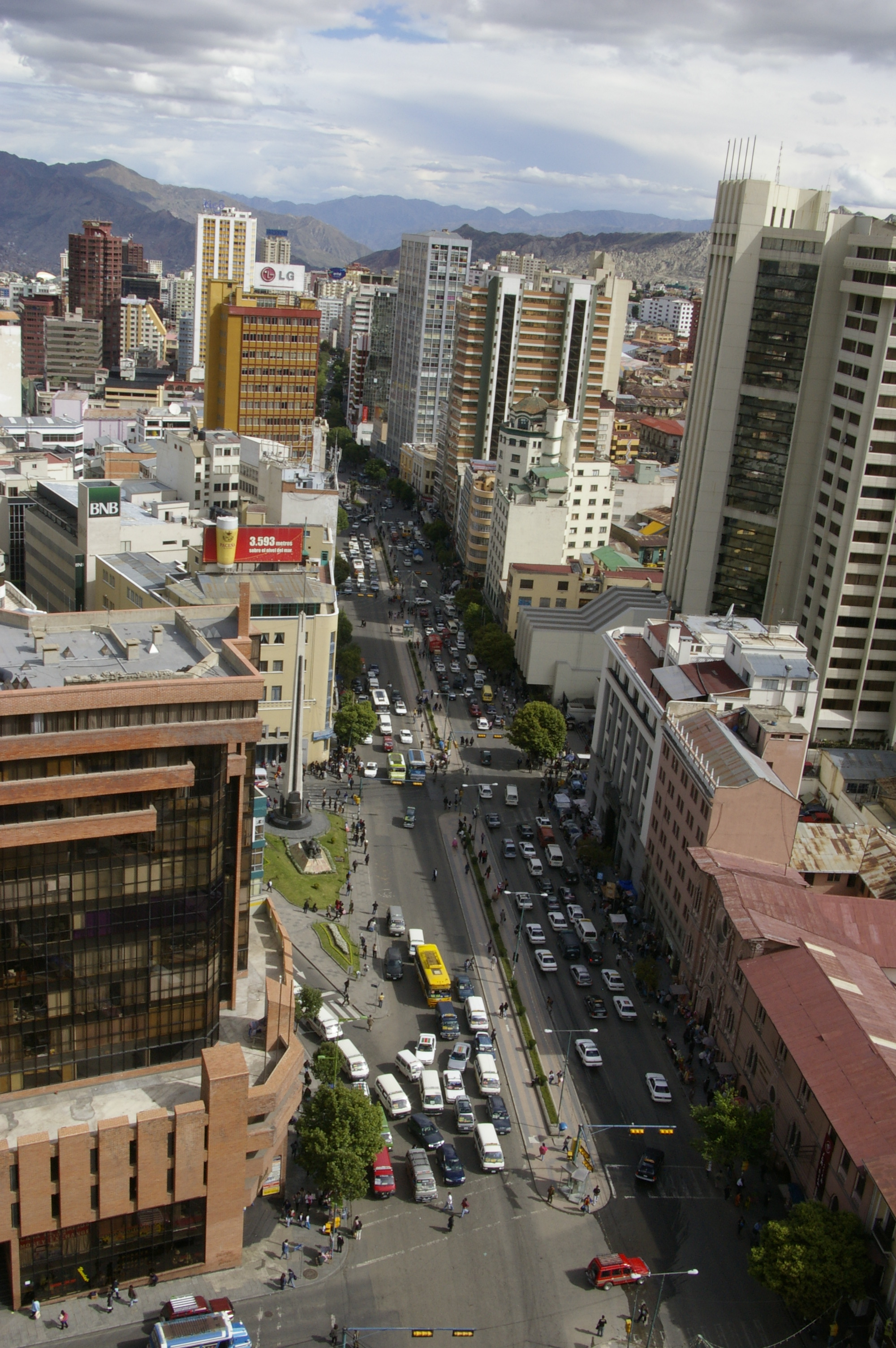 La Paz, Bolivia